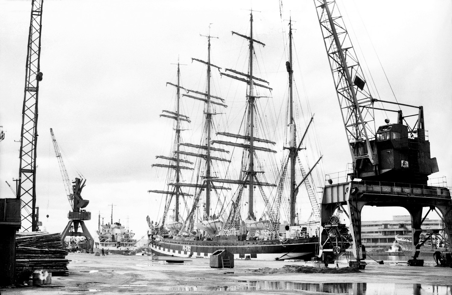 Krusenstern Tallinnas, Paljassaare sadamas 75 (11)